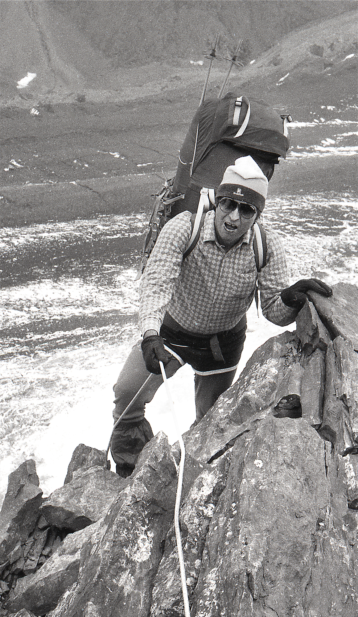 Boriss Slepikovski